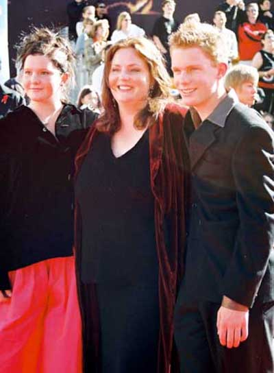 Philippa Boyens mit ihrem Sohn Calum Gittins und ihrer Tochter Phoebe Gittins bei der Weltpremiere des dritten Teils des Herrn der Ringe in Wellington (Neuseeland)